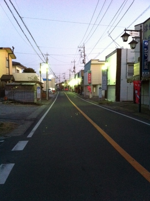 国道354号境町内